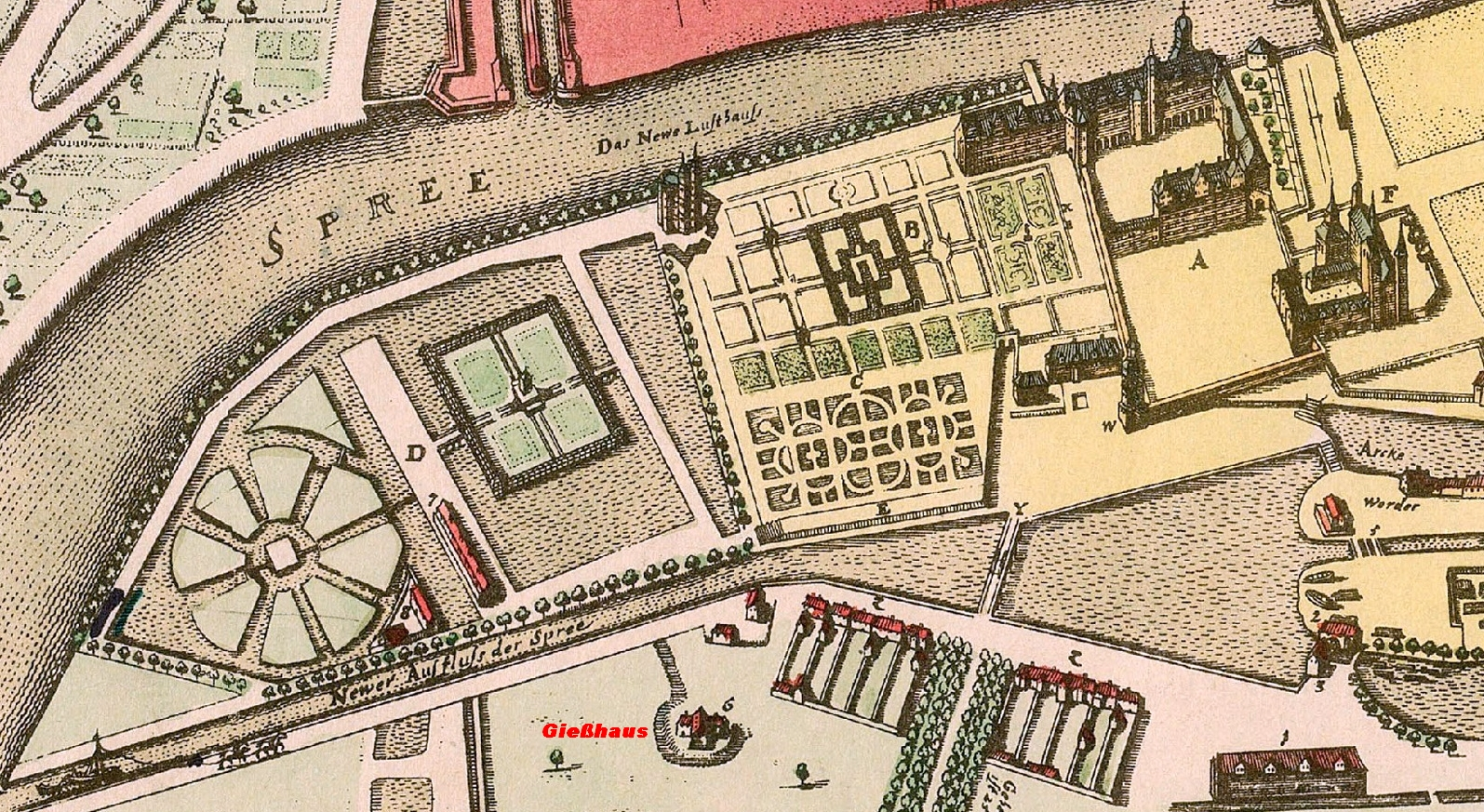 Lage des Königlichen Gießhauses in Berlin 1652